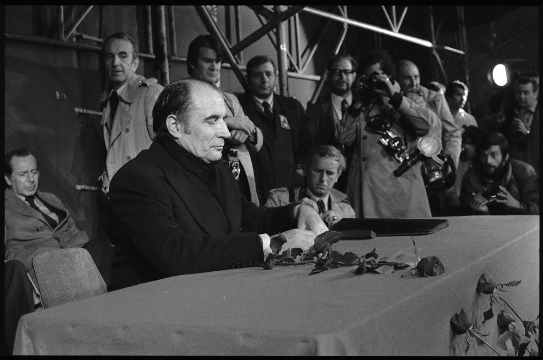 Toulouse (Haute-Garonne). 3 Mai 1974. Vue de François Mitterand lors d'une réunion.